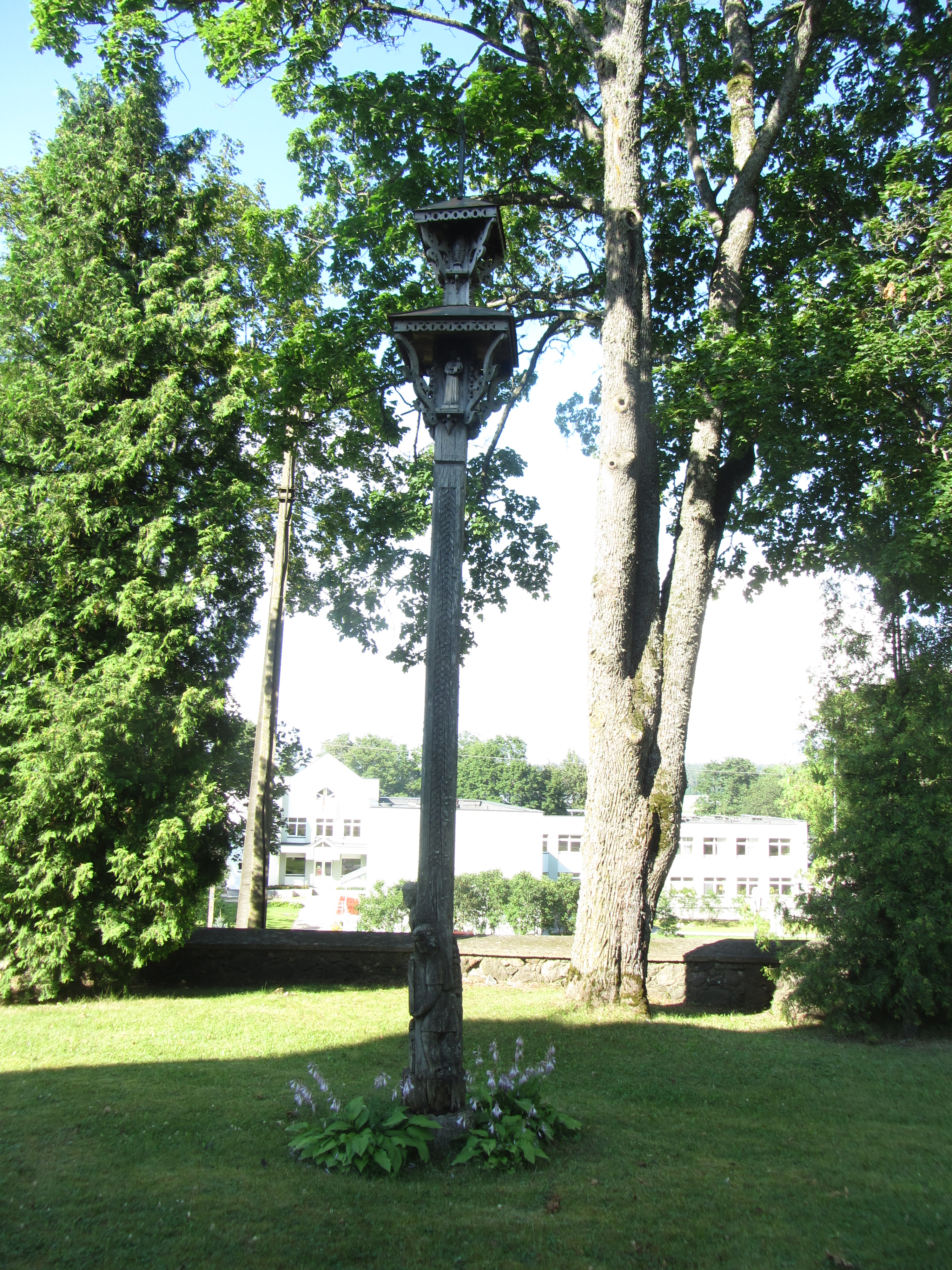 Sudeikiai, Lithuania